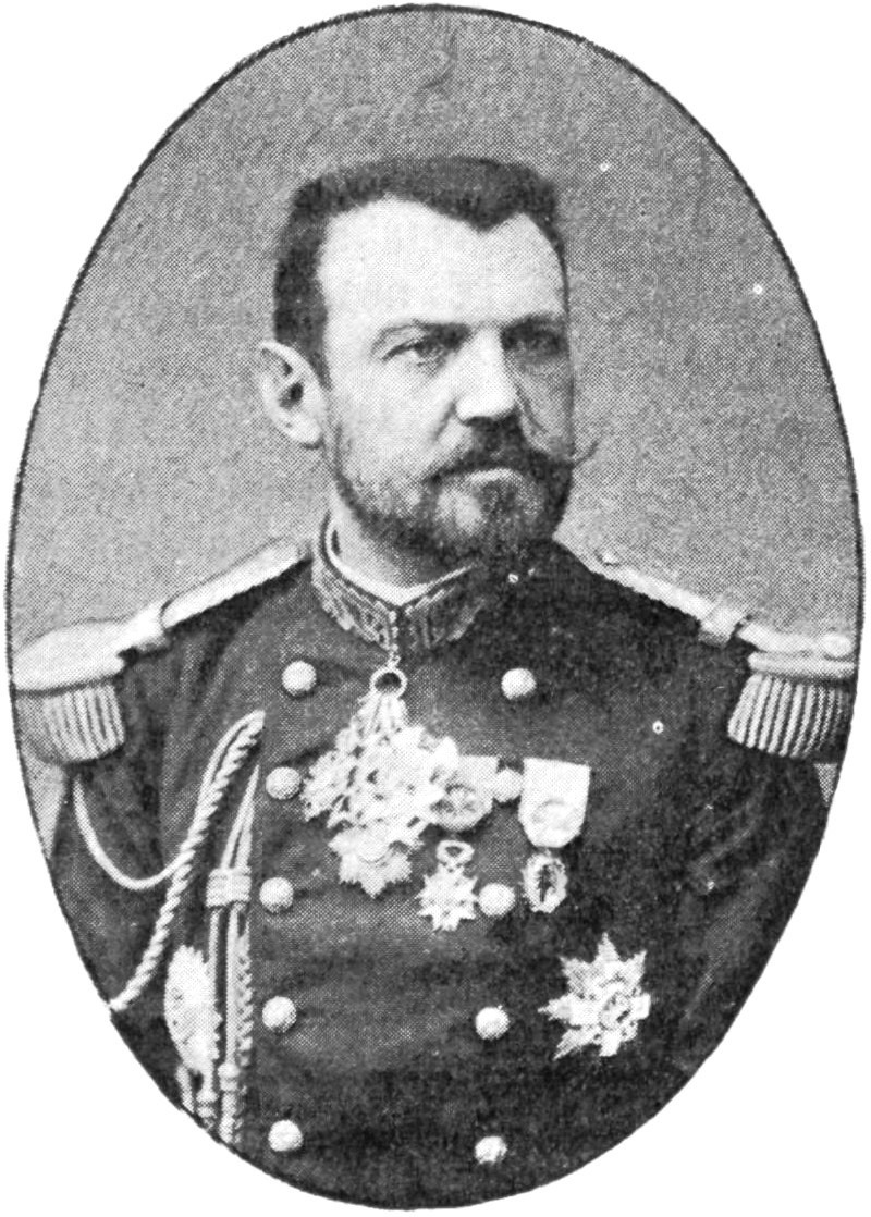 "Le général Brugère. (Photographie Pierre Petit)".